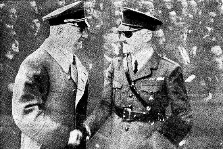 Julius Streicher et Jean Boissel lors d'un rassemblement antisémite au Herkules-Velodrom à Nuremberg le 9 mai 1935. Photographie publiée dans Der Stürmer (n°10, mars 1938).